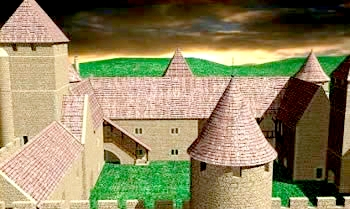 Bâtiments au 16eme siècle